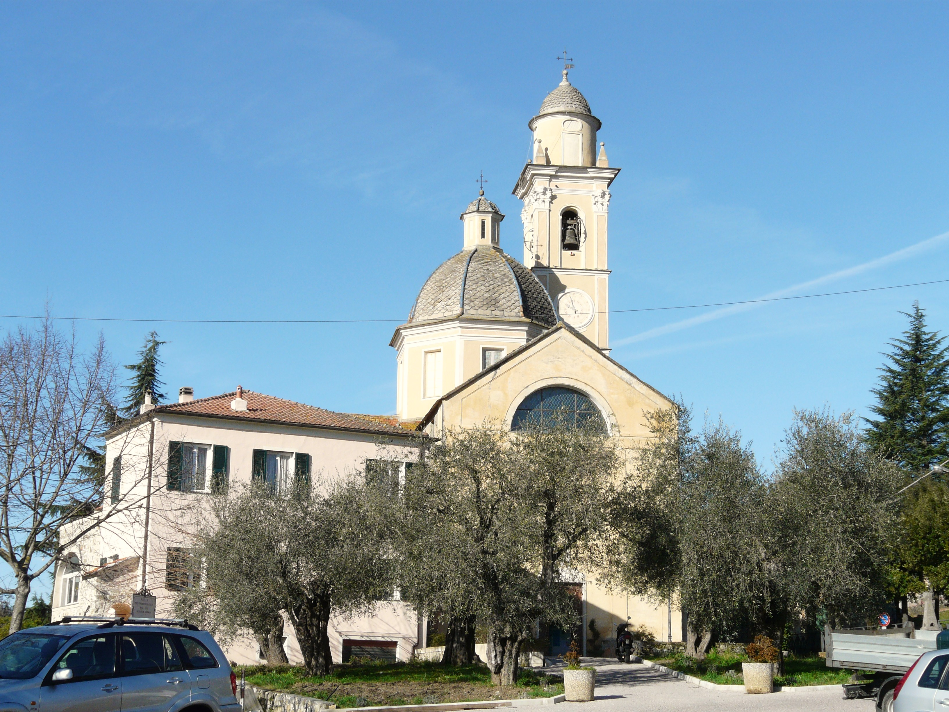 Chiesa della Natività, Garlenda, Liguria, Italia